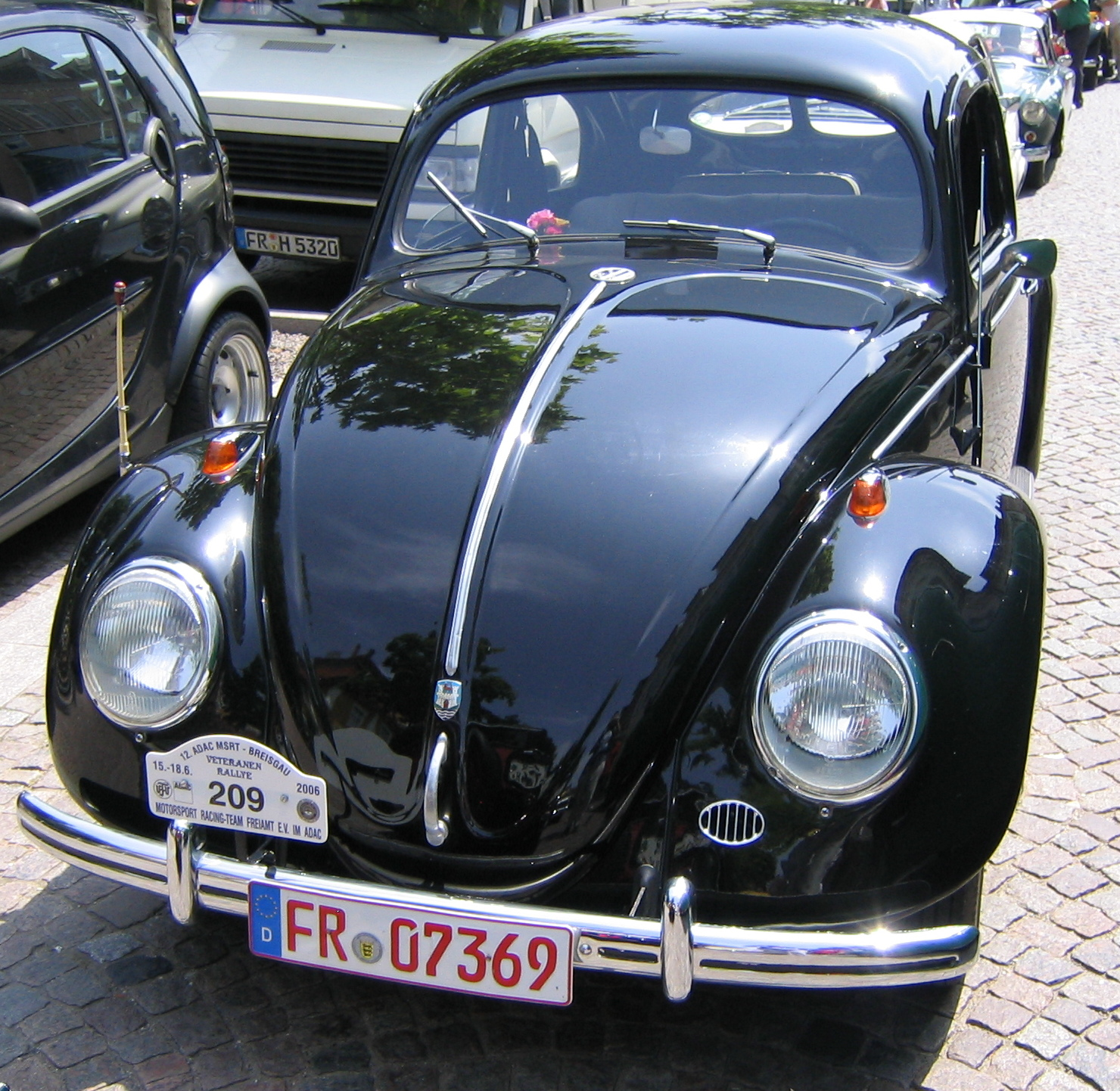 aufgenommen während eines Oldtimer-Treffens im Emmendingen, Deutschland